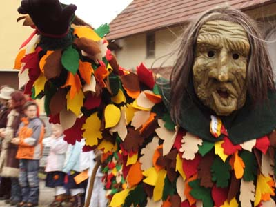 Waldschrat der Narrenzunft Wald-Schrat Raderach